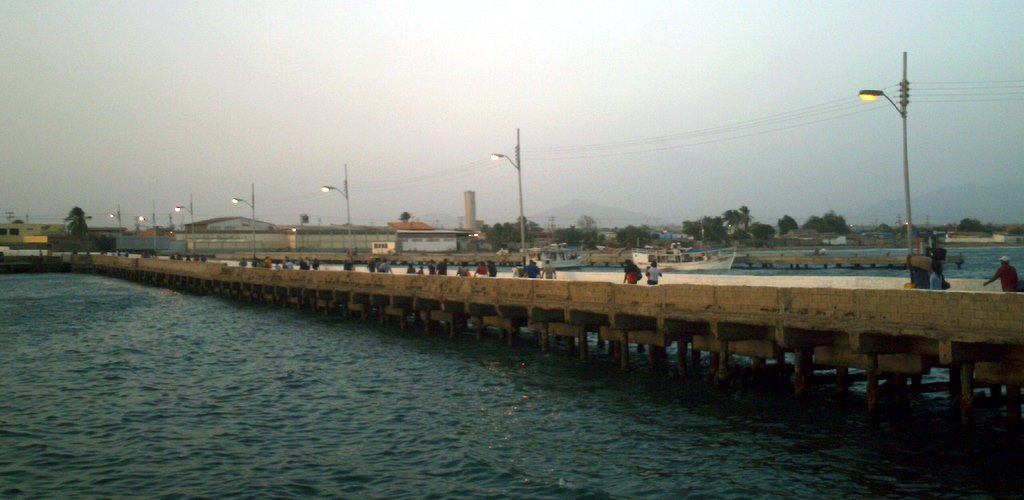 Muelle Conferry de Punta de Piedras.